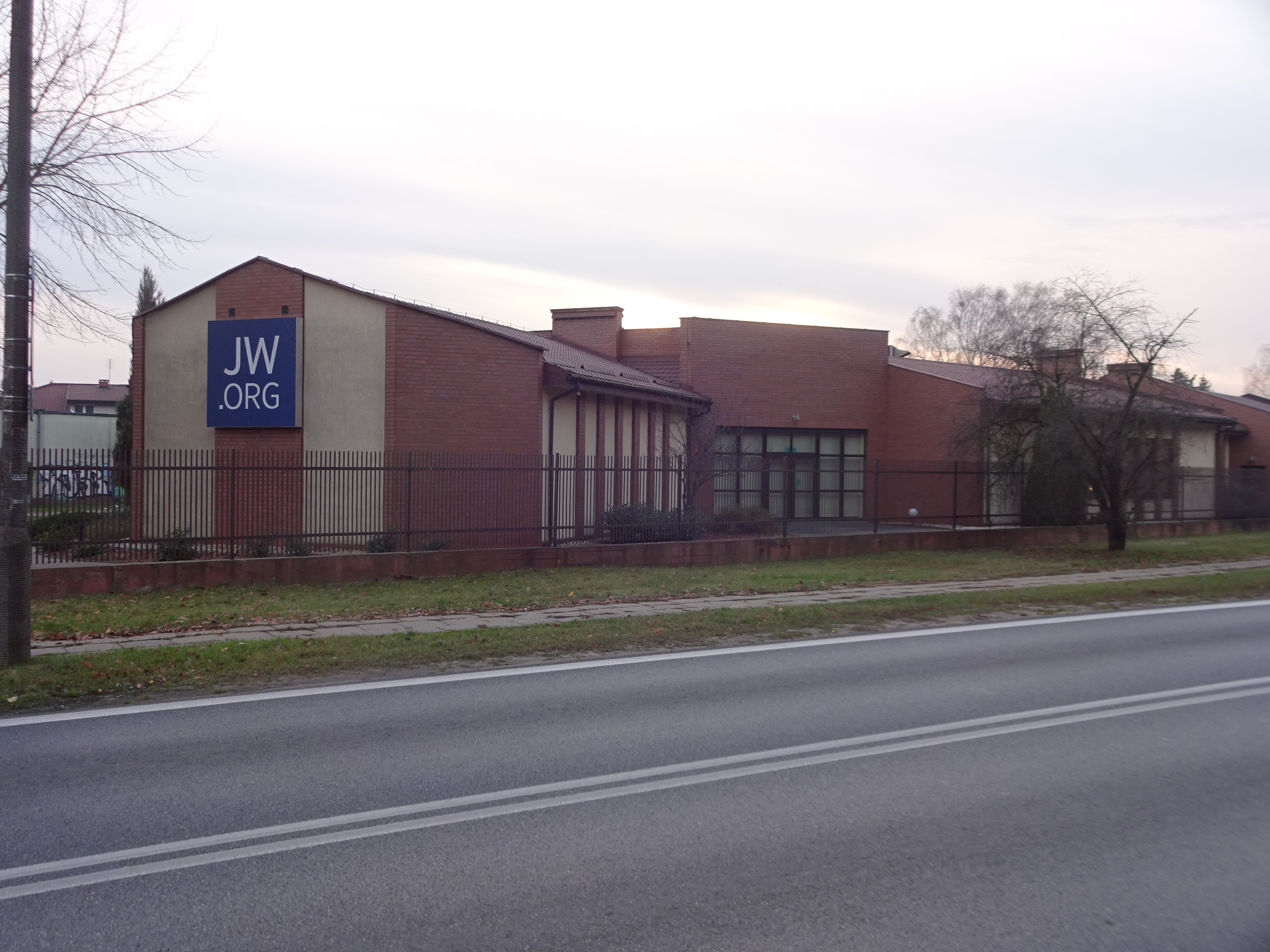 Sala Królestwa Warszawa ul. Kanałowa 47